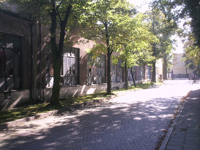 GB WOP warsztaty